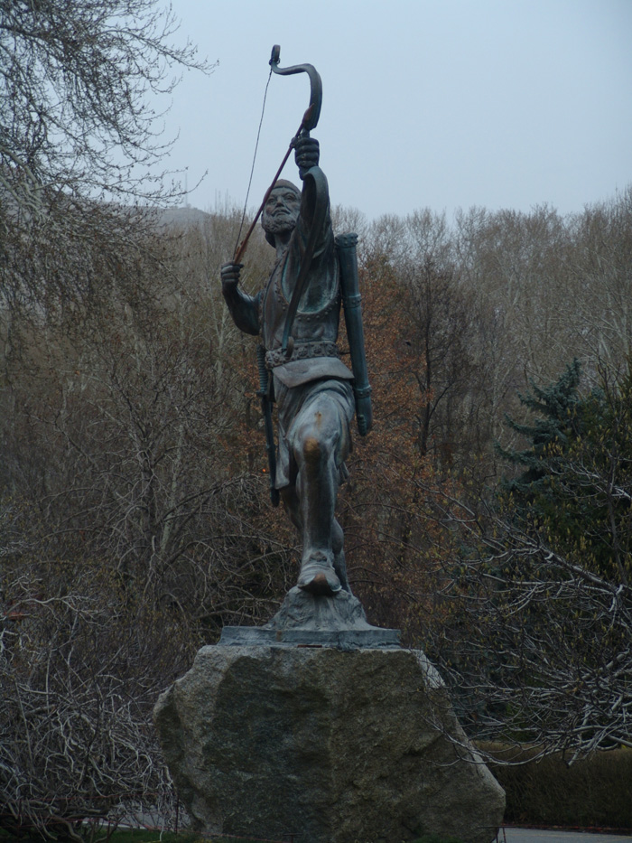 تندیس آرش کمانگیر در مجموعه سعدآباد تهران